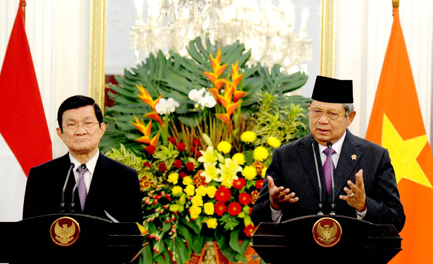 Presiden SBY dan Presiden Vietnam Truong Tan Sang memberi keterangan pers bersama soal hasil pertemuan bilateral di Istana Merdeka, Kamis 27 Juni 2013 sore.